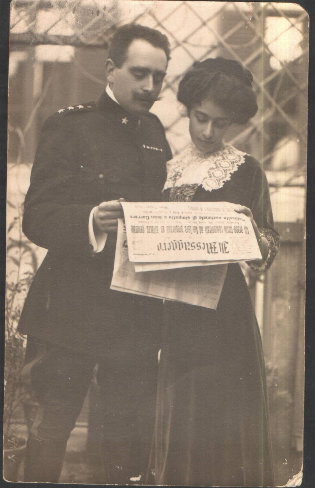 ג'וליה וגוידו מנדס קוראים את הודעת חתונתם בעיתון צולם ב-1911